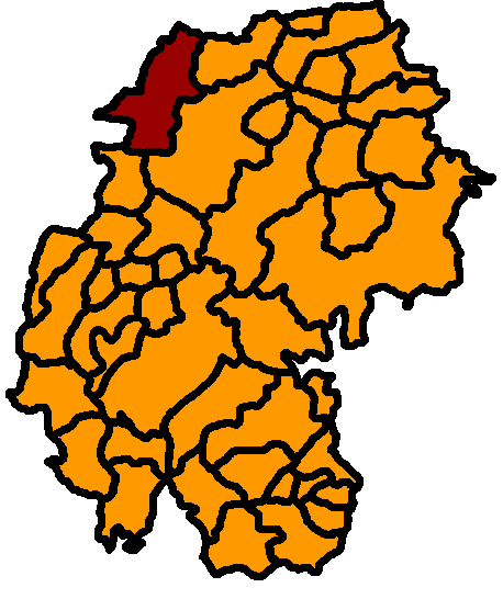 Wachsenburggemeinde hervorgehoben, Ilm-Kreis